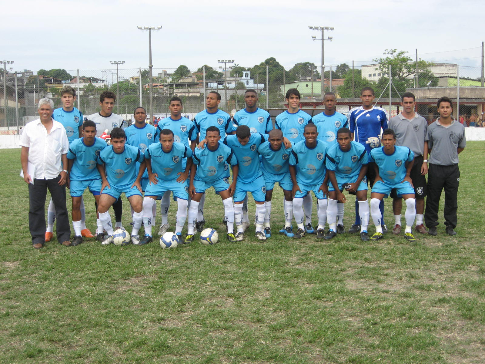 Atletas do Leme Futebol Clube Zona Sul perfilados na disputa da Terceira Divisão de 2009